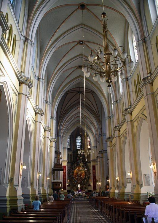 Pabianice, Poland by Ewa and Maek Wojciechowsy